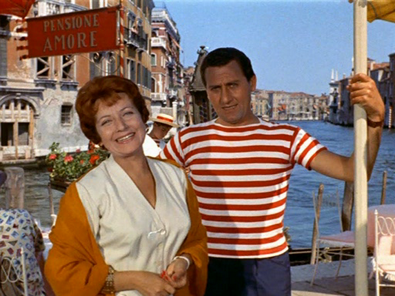 actors Anna Campori and Alberto Soldi in a scene of the film Venezia, la luna e tu